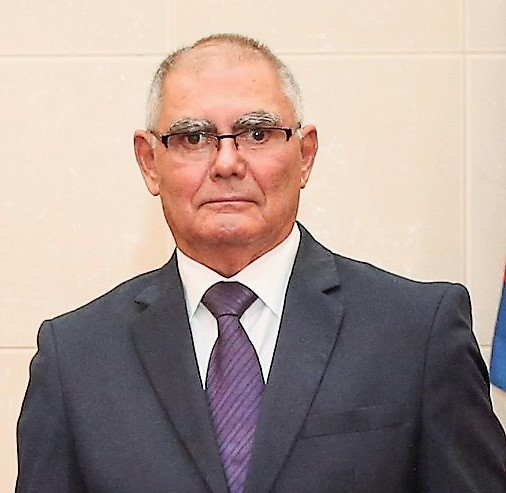 Omar Lauro Marreto Betancourt übergibt an Francisco Guterres seine Akkreditierung